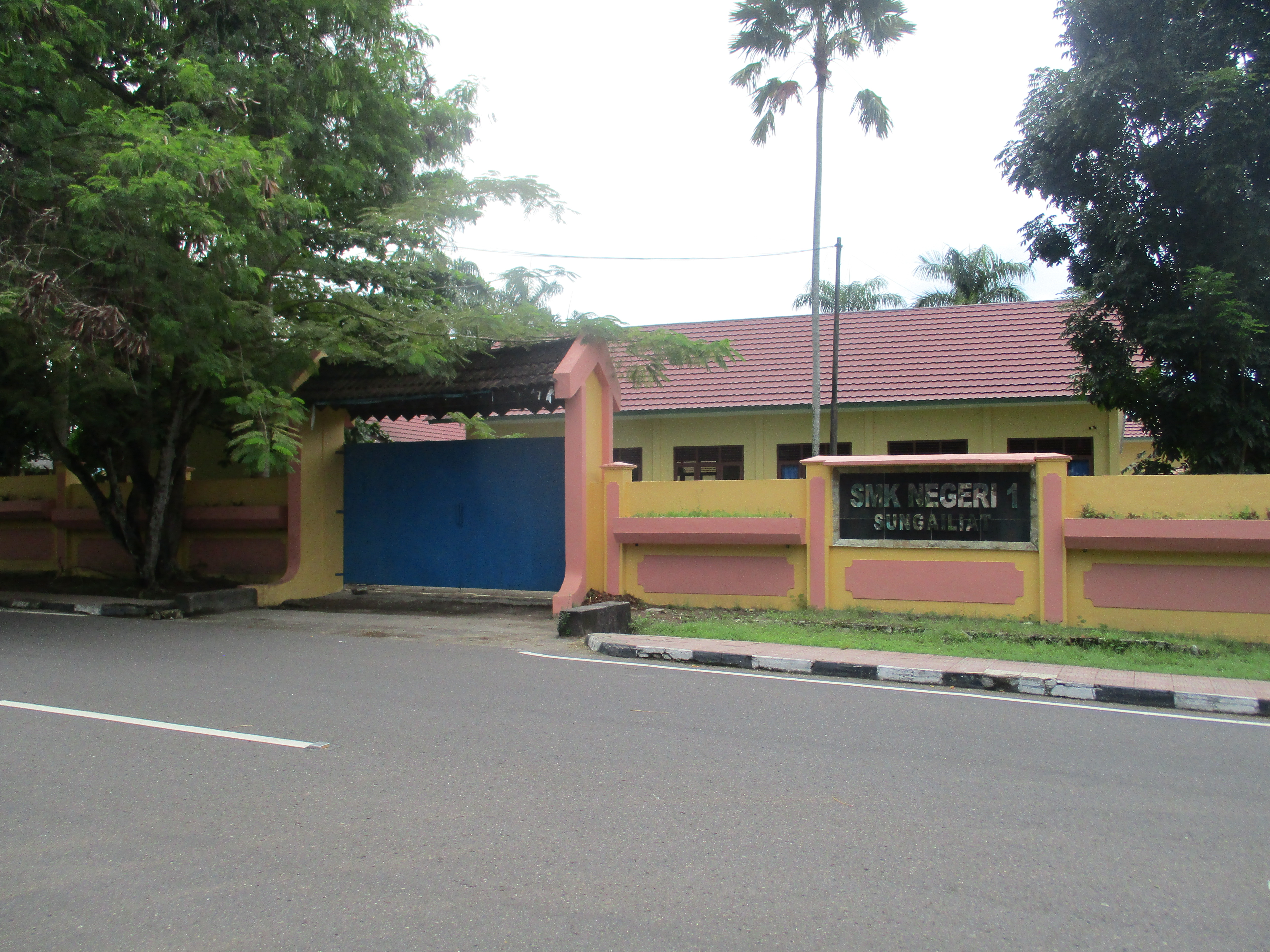 邦加勿里洞島省烈港市第一職業高中學校 / SMK Negeri 1 Sungailiat, Bangka Belitung